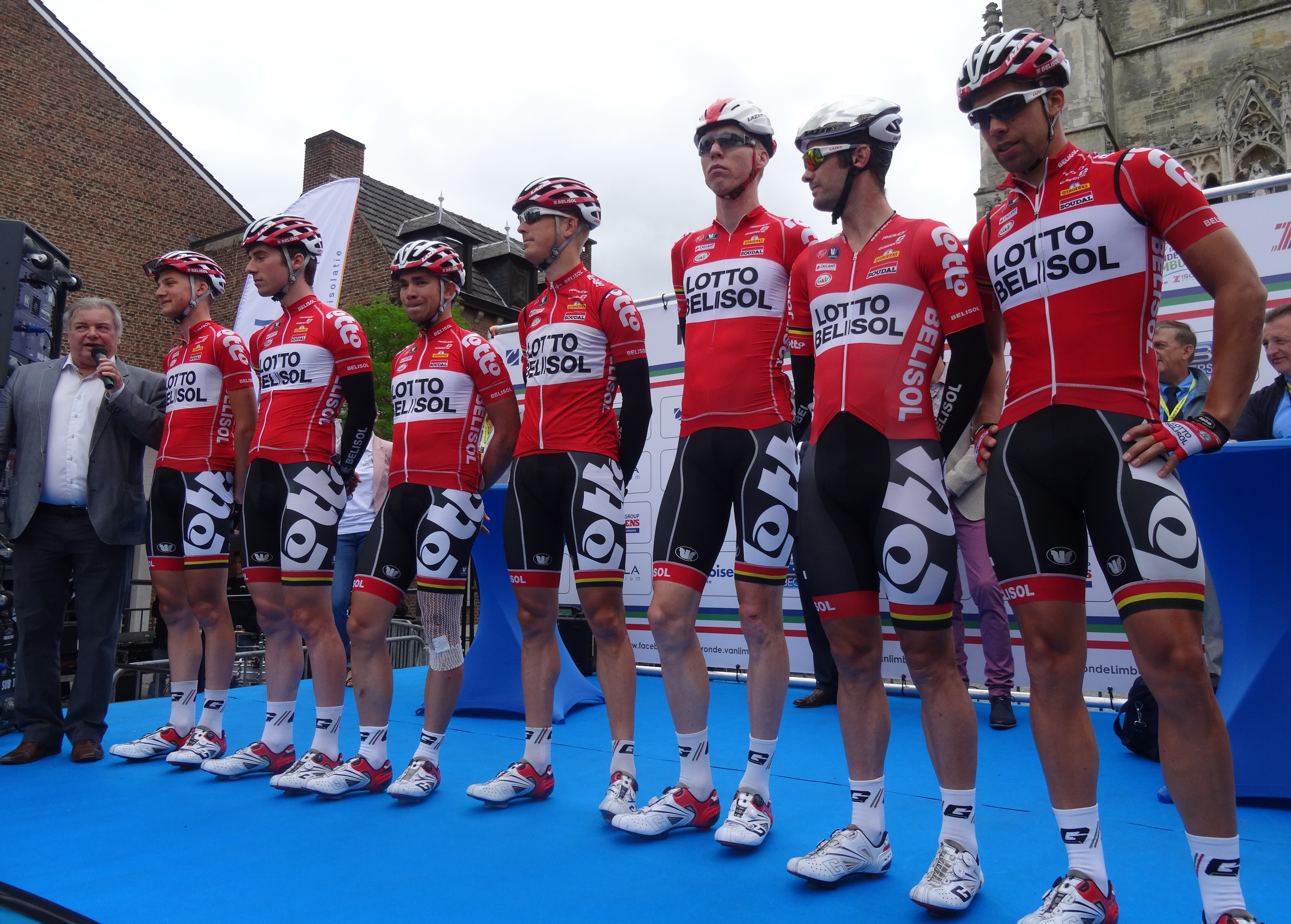 Reportage photographique réalisé le dimanche 15 juin à l'occasion du départ et de l'arrivée du Tour du Limbourg 2014 à Tongres, Belgique.